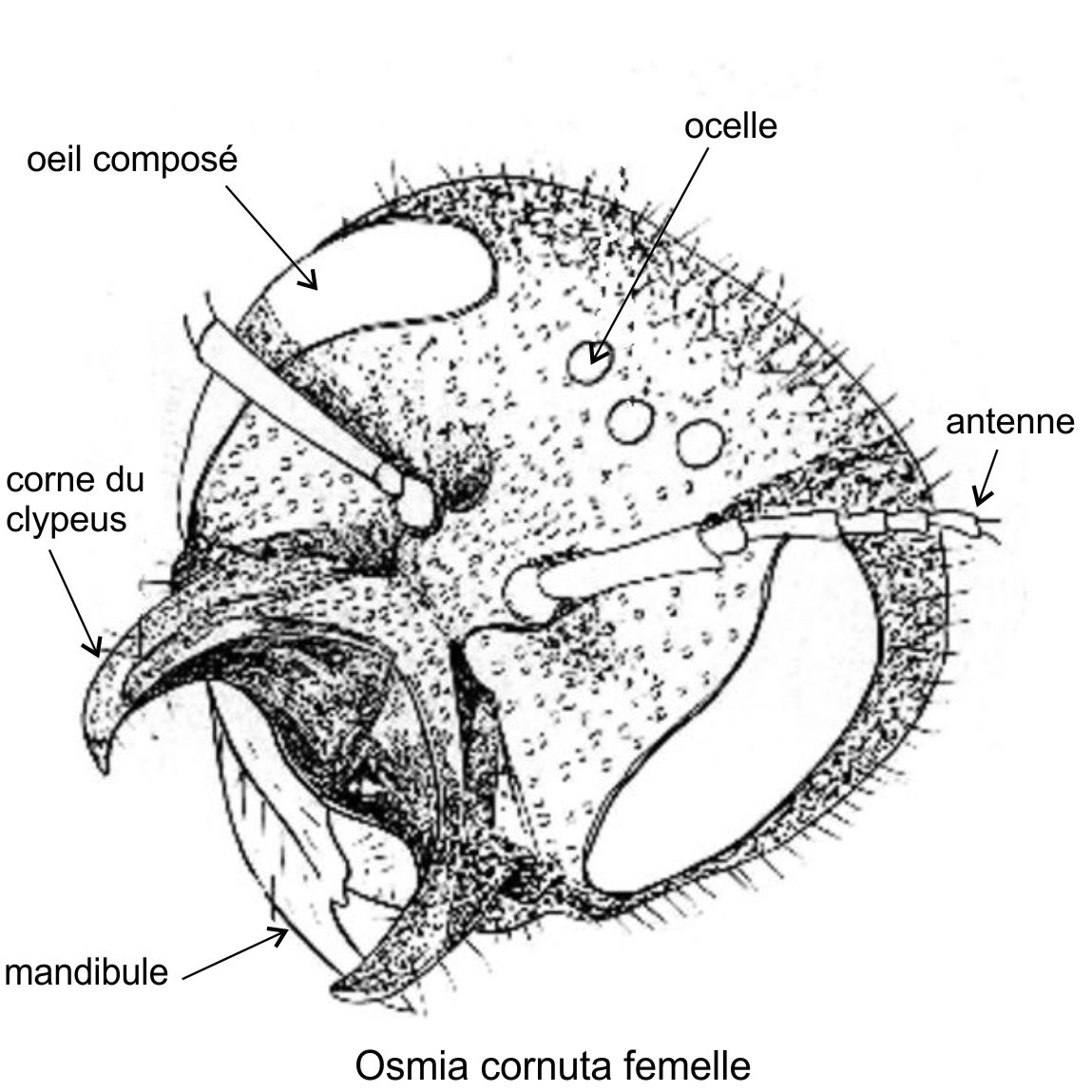 Osmia cornuta, tête de femelle, d'après un dessin modifié de Jean-Noël TASEI, « Observations sur le développement d'Osmia cornuta Latr. et Osmia rufa L. (HYMENOPTERA MEGACHILIDAE) », dans Apidologie, vol. 4, no 4, 1973